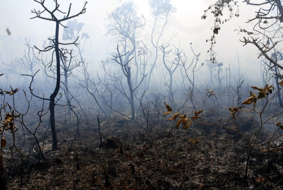 Incêndio no Parque Nacional de Brasília; queimada e destruição ambiental.